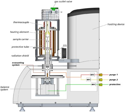 Netzsch STA449F1 voor simultaan TGA en DSC